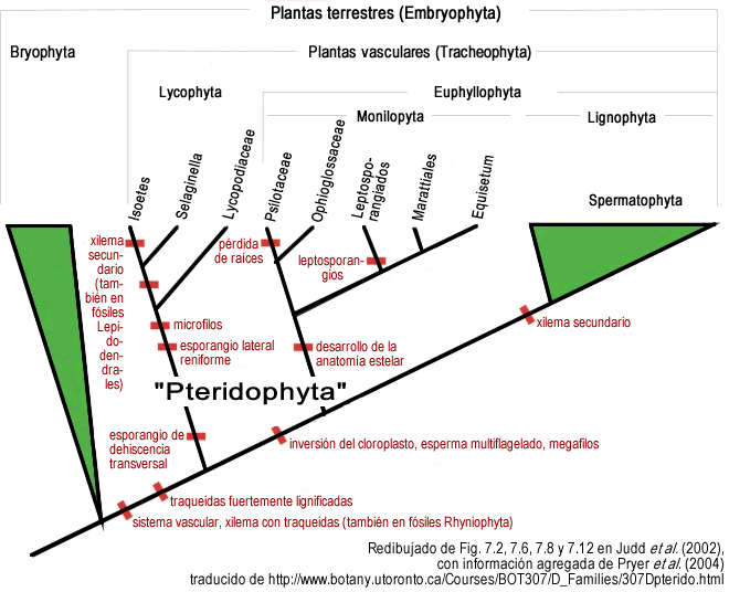 Árbol filogenético actualizado de los diferentes grupos de pteridofitos, sensu Judd et al. (2002) con agregados según Pryer et al. (2004).